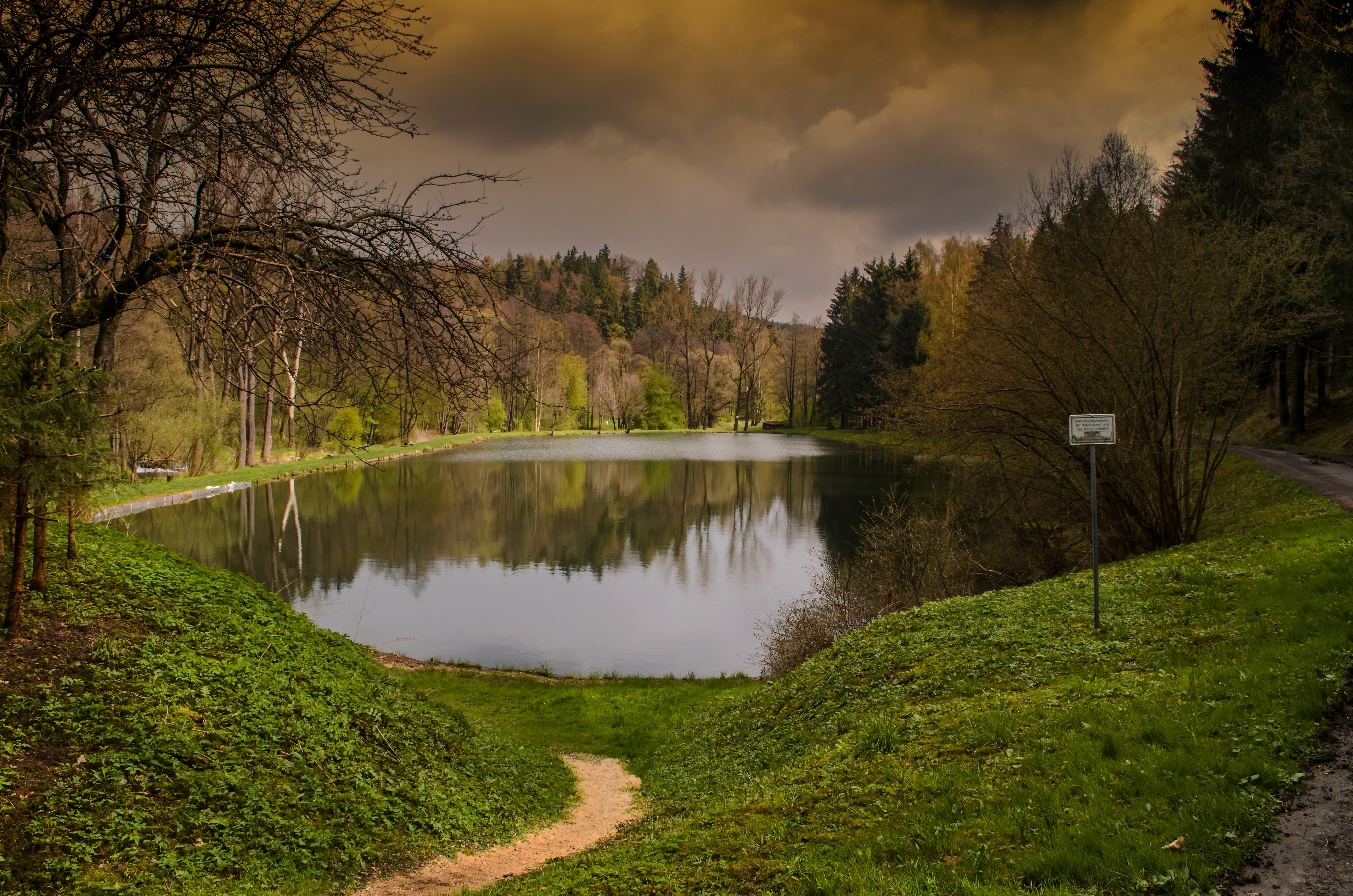 Blick über den Wiesenwegteich in Sebnitz, Sachsen; Bereich im FFH-Gebiet DE-5050-302 „Lachsbach- und Sebnitztal“ – Das Foto habe ich während meinem Wanderurlaub gemacht. Im See ist das Schwimmen untersagt. Nördlich (im Bild links) vom See liegt die Tschechische Republik.